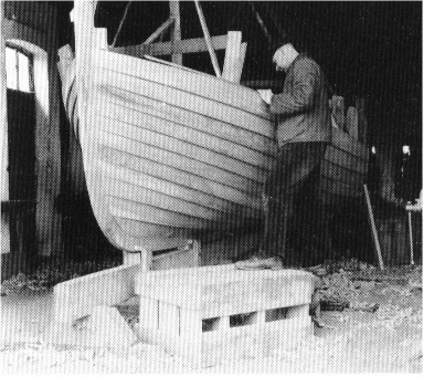 Klinkerbowies, dat Bild is upnahmen un freegeven wurrn von den Bootsboer Karl Pundt up ene Werft in Berne